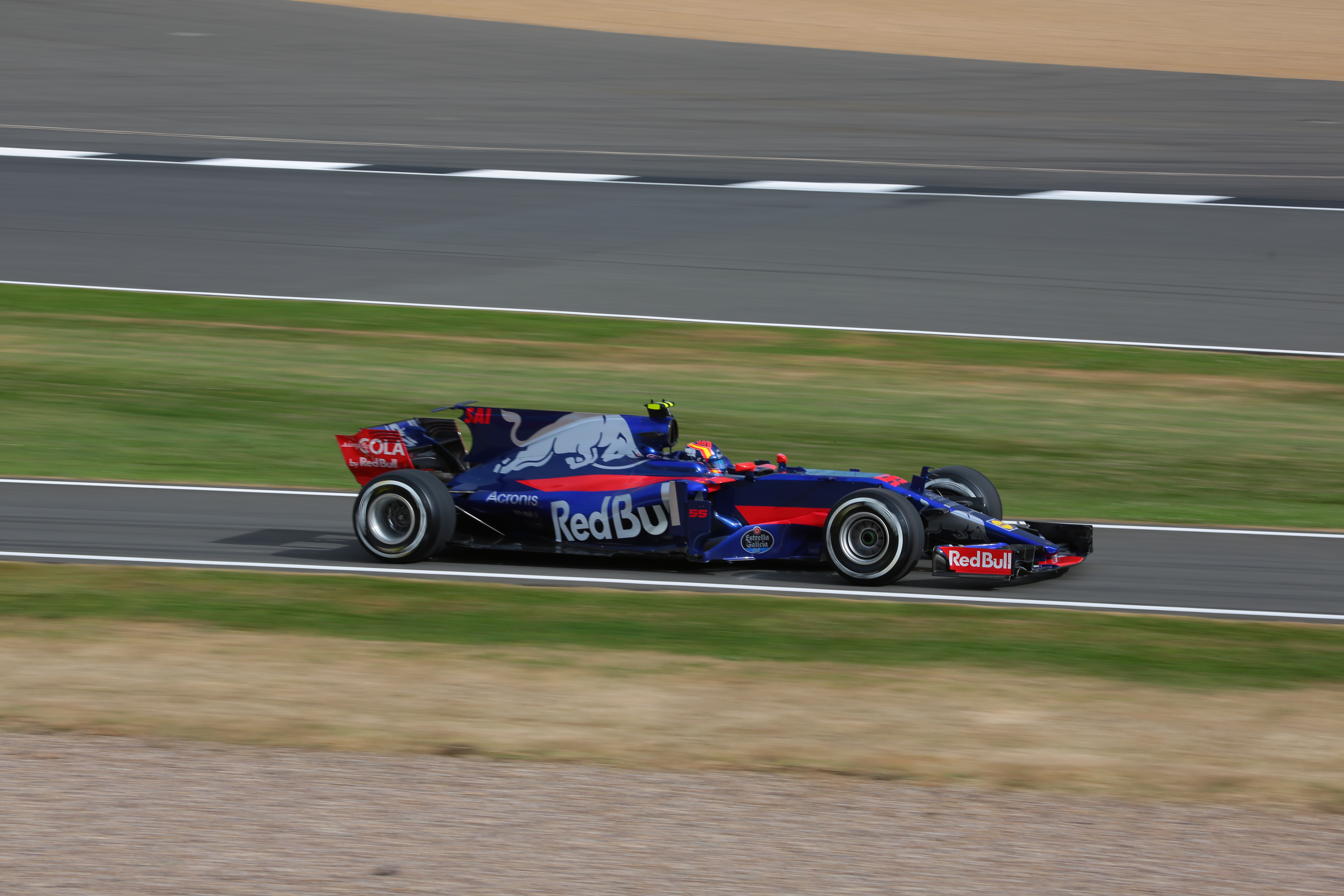 f1